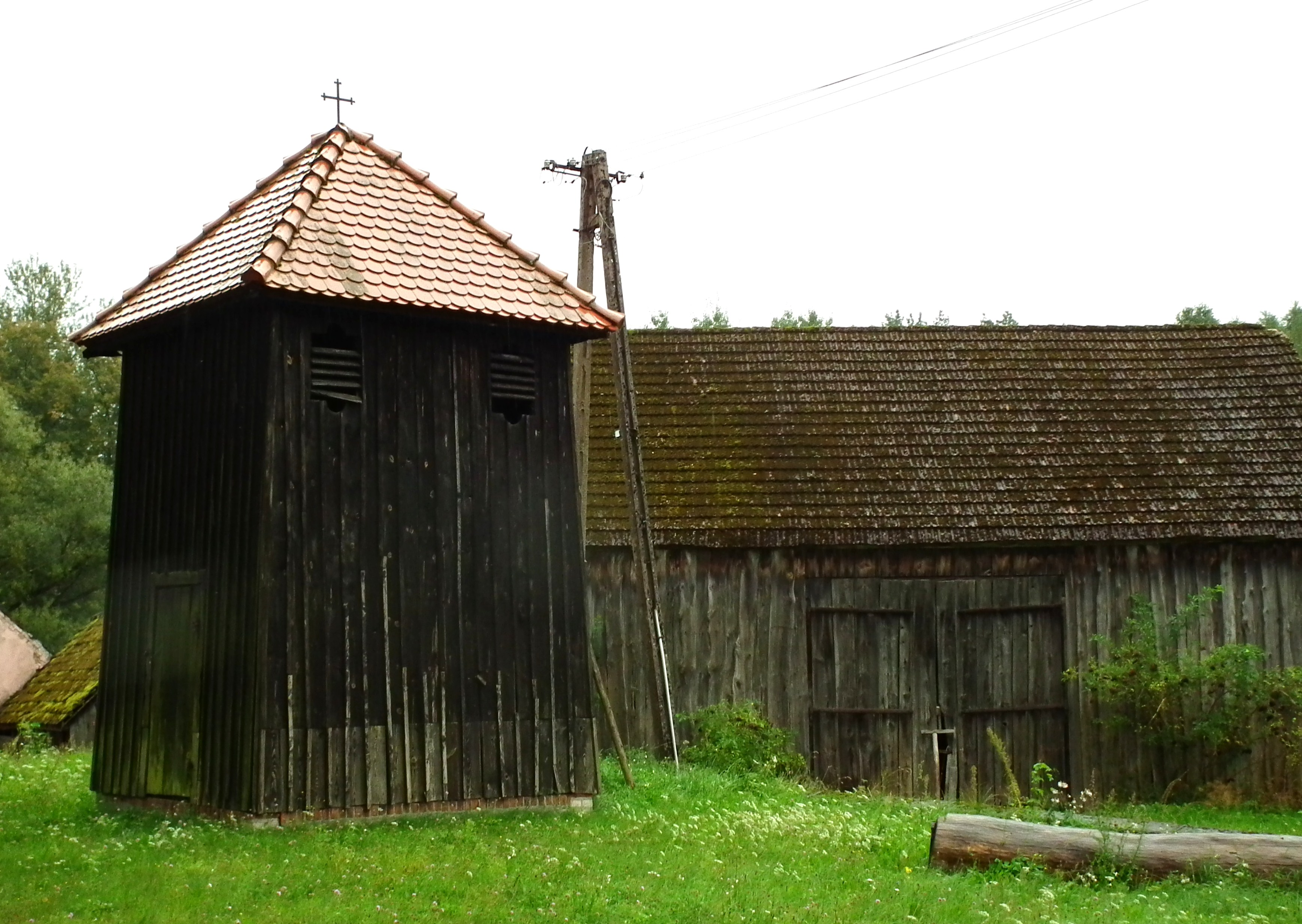 Kościół MB Różańcowej w Martwi k/Tuczna.